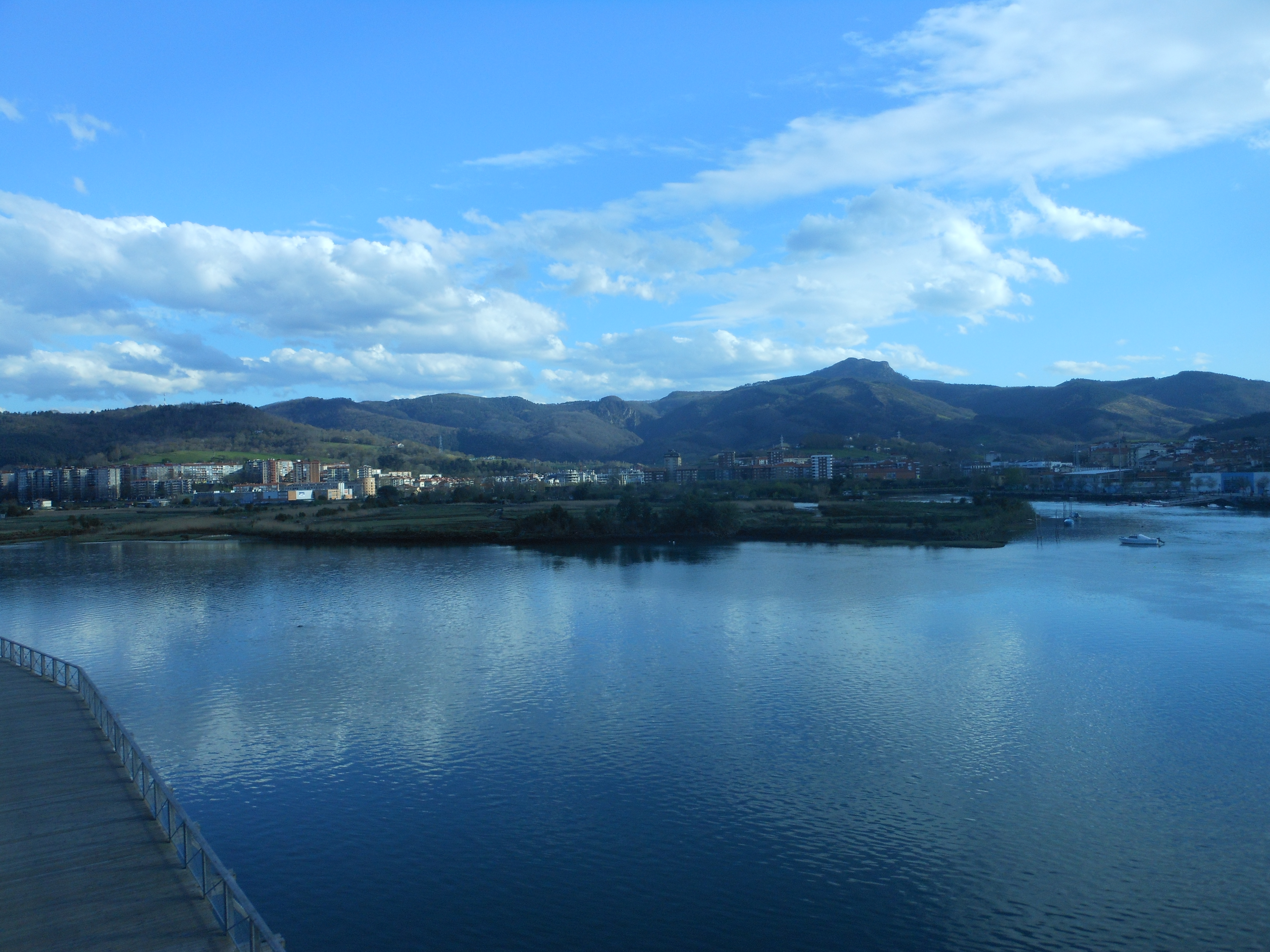 Imagen de la isla Galera situada en el río Bidasoa (Irún)